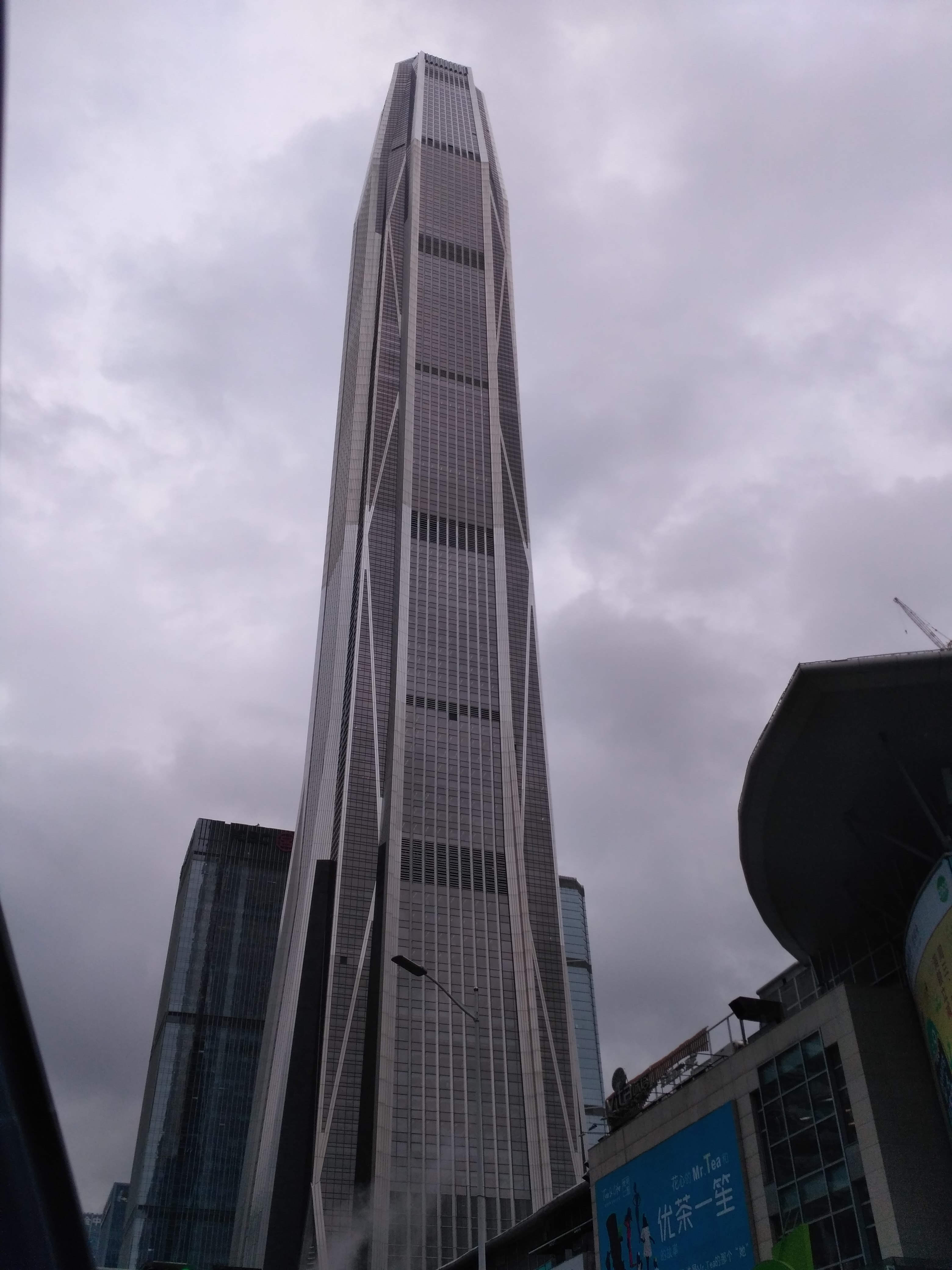 Ping'an International Financial Center in June 2017 from 3rd Fuhua Rd.jpeg